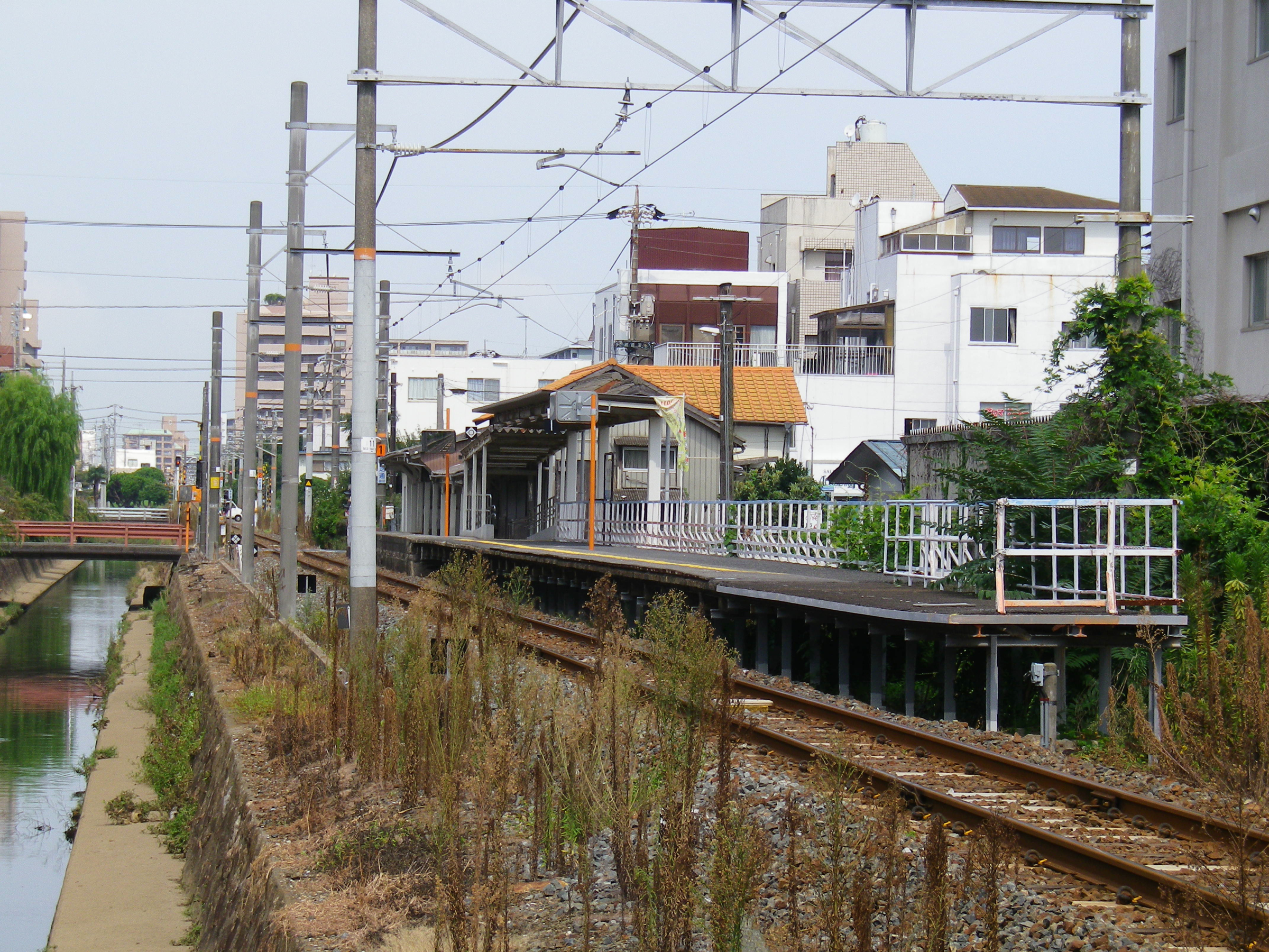 山口県宇部市。JR宇部線琴芝駅プラットホーム。